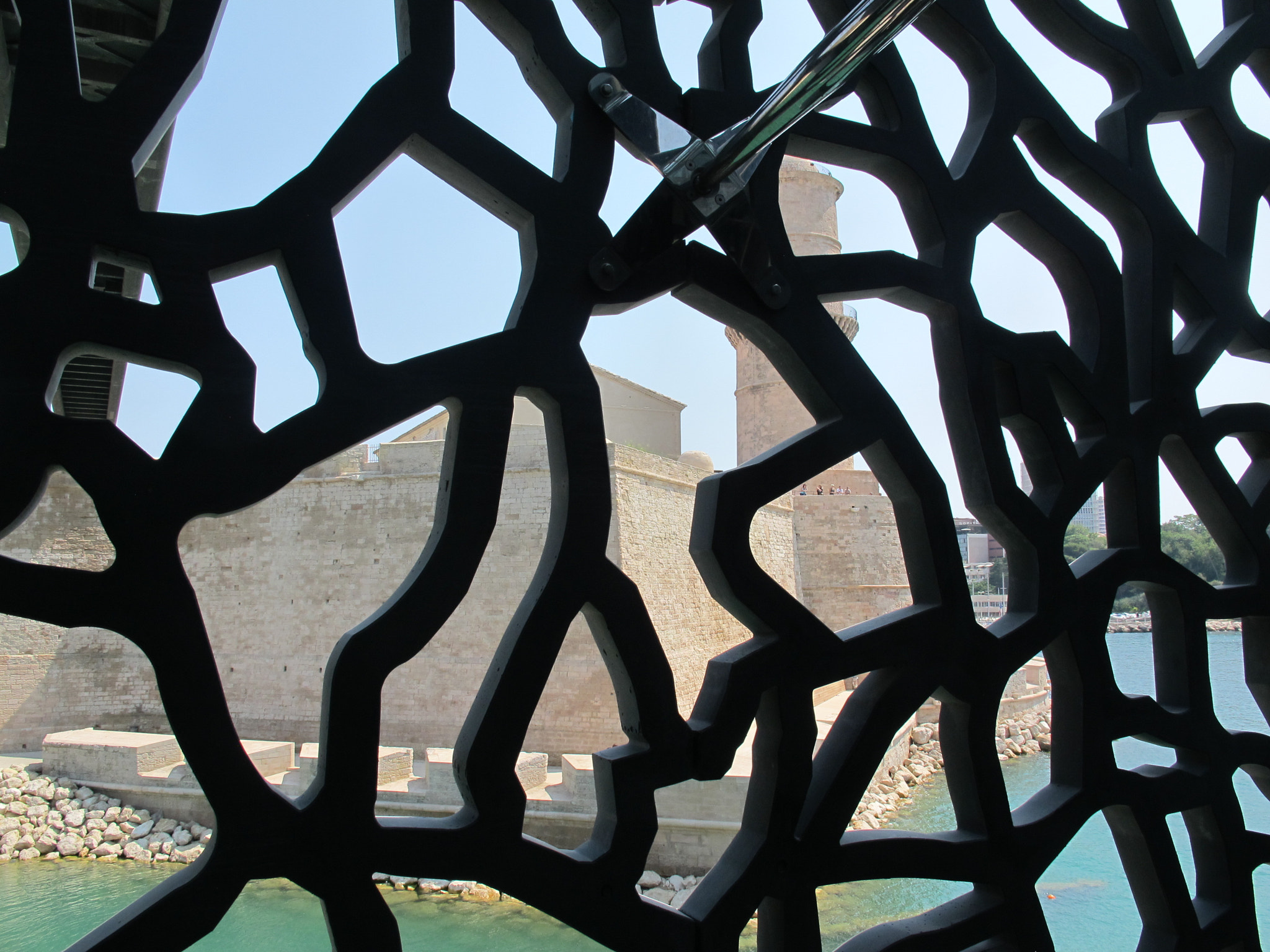 500px provided description: Filtro [#francia ,#france ,#marseille ,#marsiglia ,#fort st jean]